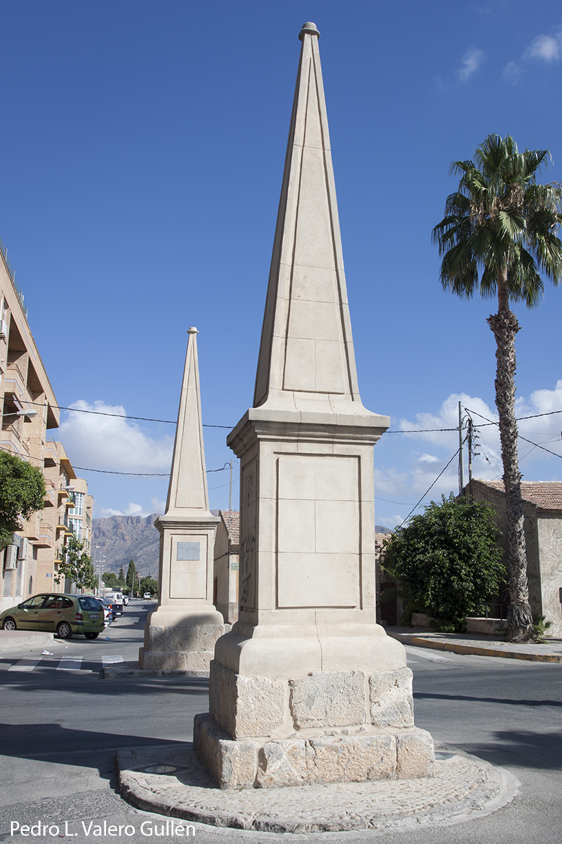 Monolitos que marcan la frontera entre los antiguos reinos de Castilla y Aragón (siglo XV). Se encuentran en la carretera Beniel-Orihuela, en la inersección con la Vereda del Reino (antigua cañada real, entre Beniel y Las Norias.